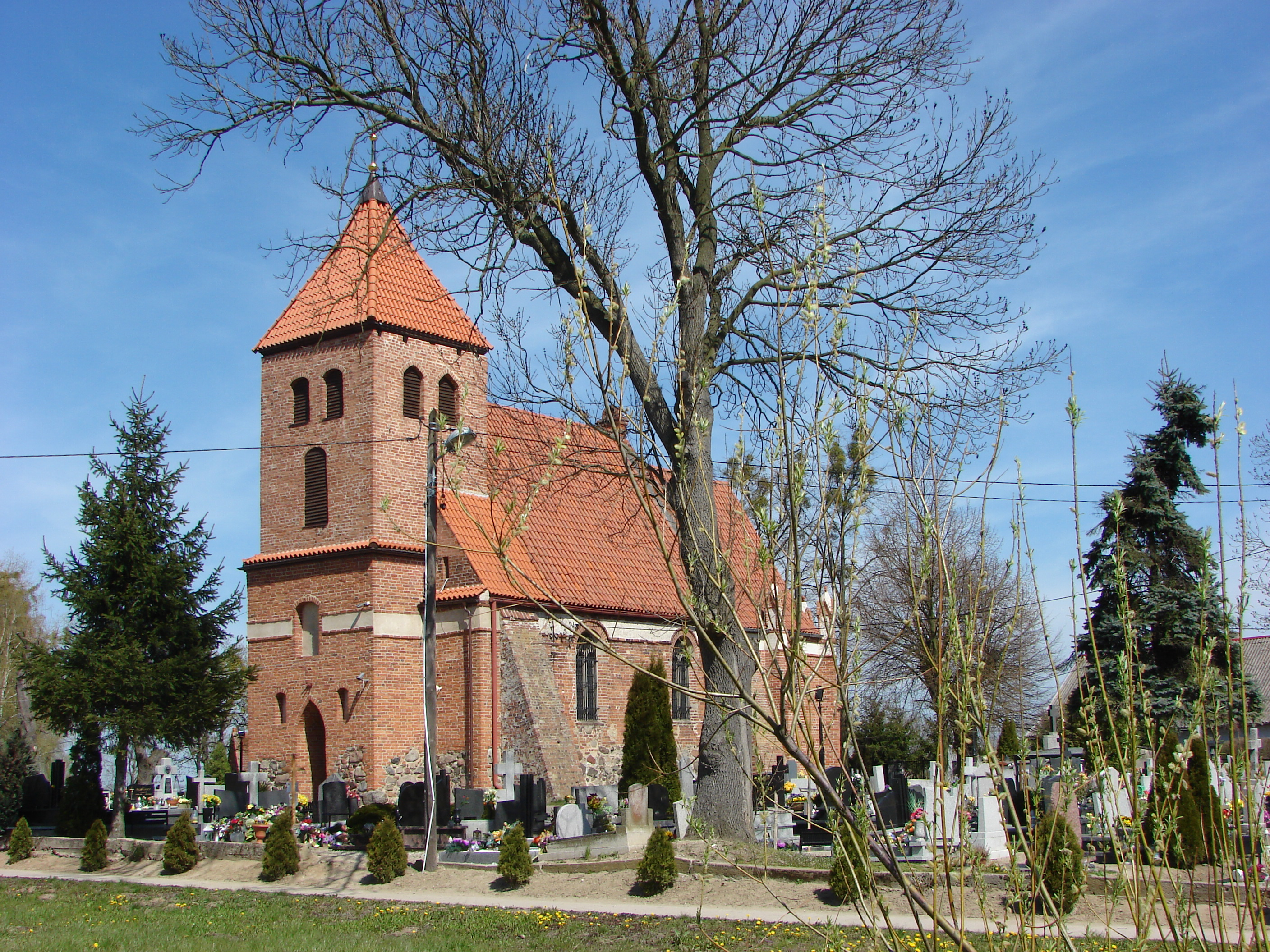 Świerczynki, Gmina Łysomice. Parish church of John the Baptist. Built turn of the 13th-14th century.